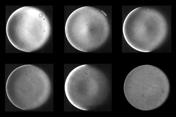 Das Foucaultsche Schneidenverfahren am Beispiel eines realen Spiegels (Apertur: 196 mm, Brennweite: 1285 mm)